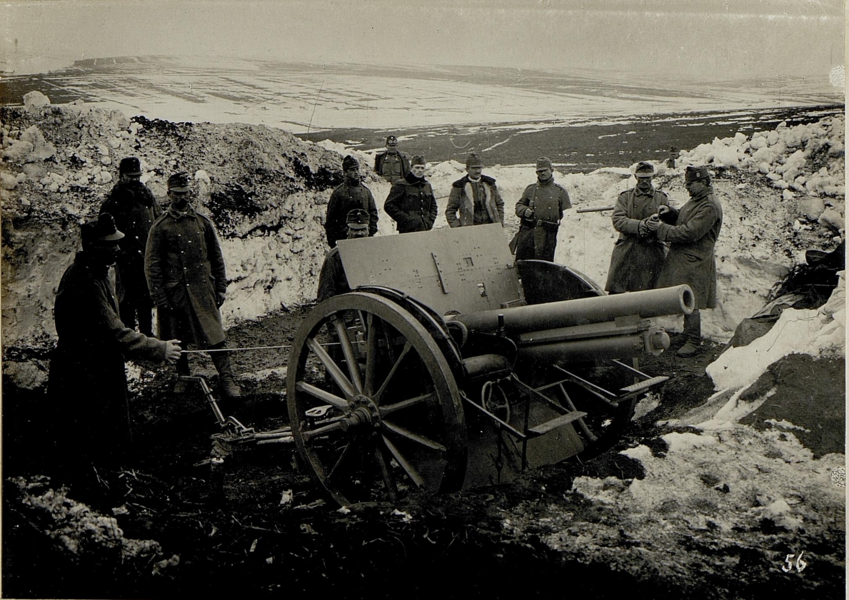 Geschütz in Feuerbereitschaft.